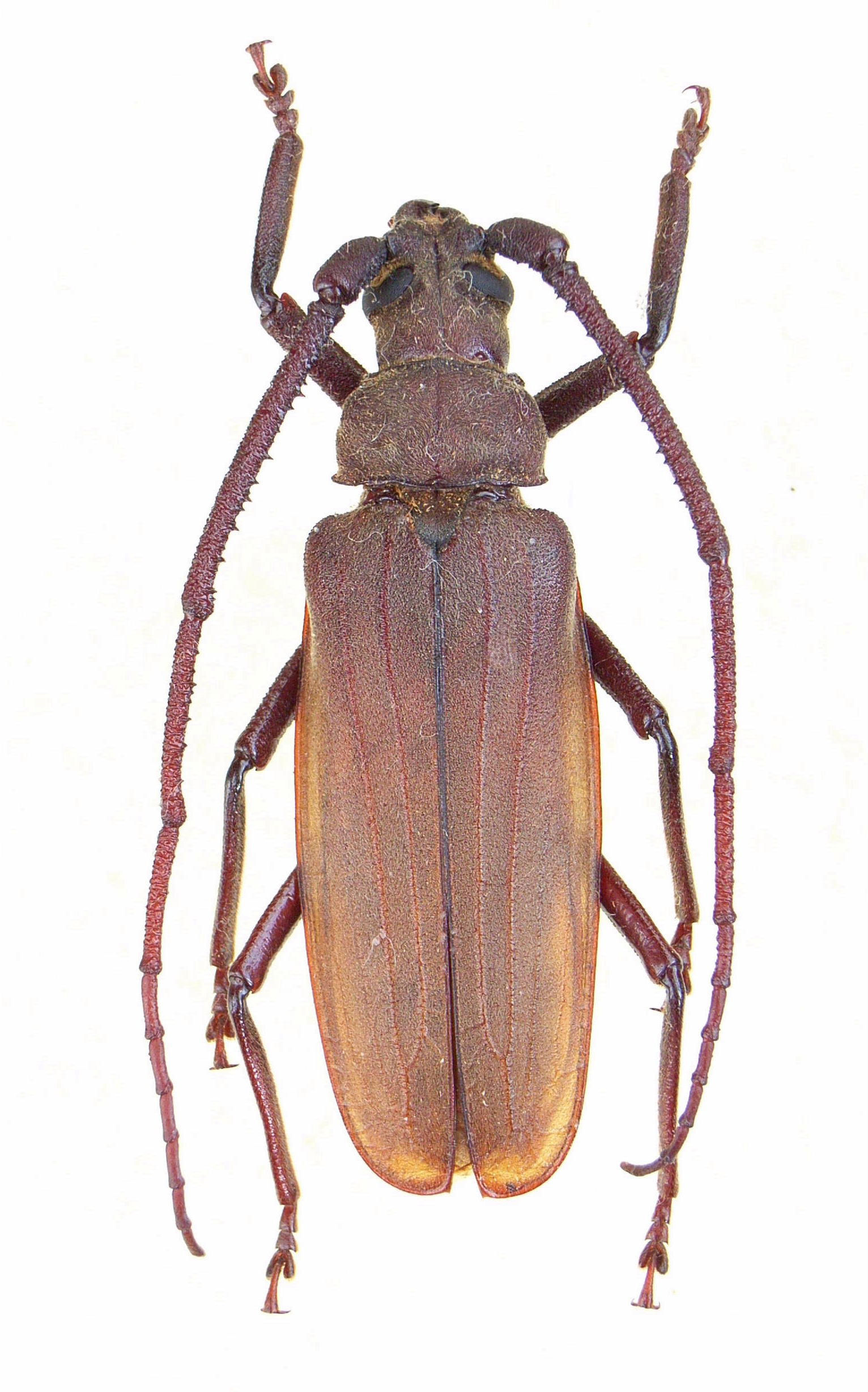 Aegosoma (Megopis) scabricorne ; Aegosoma scabricorne